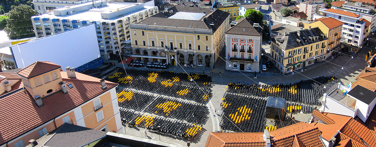 Vista diurna su Piazza Grande